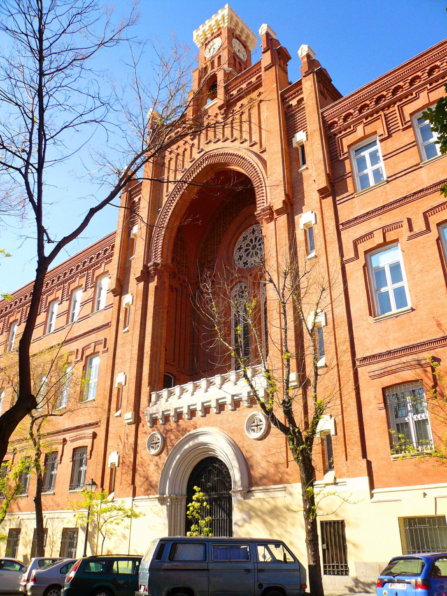 Madrid - Iglesia de la Inmaculada y San Pedro Claver (Colegio de Areneros, Universidad Pontificia de Comillas)